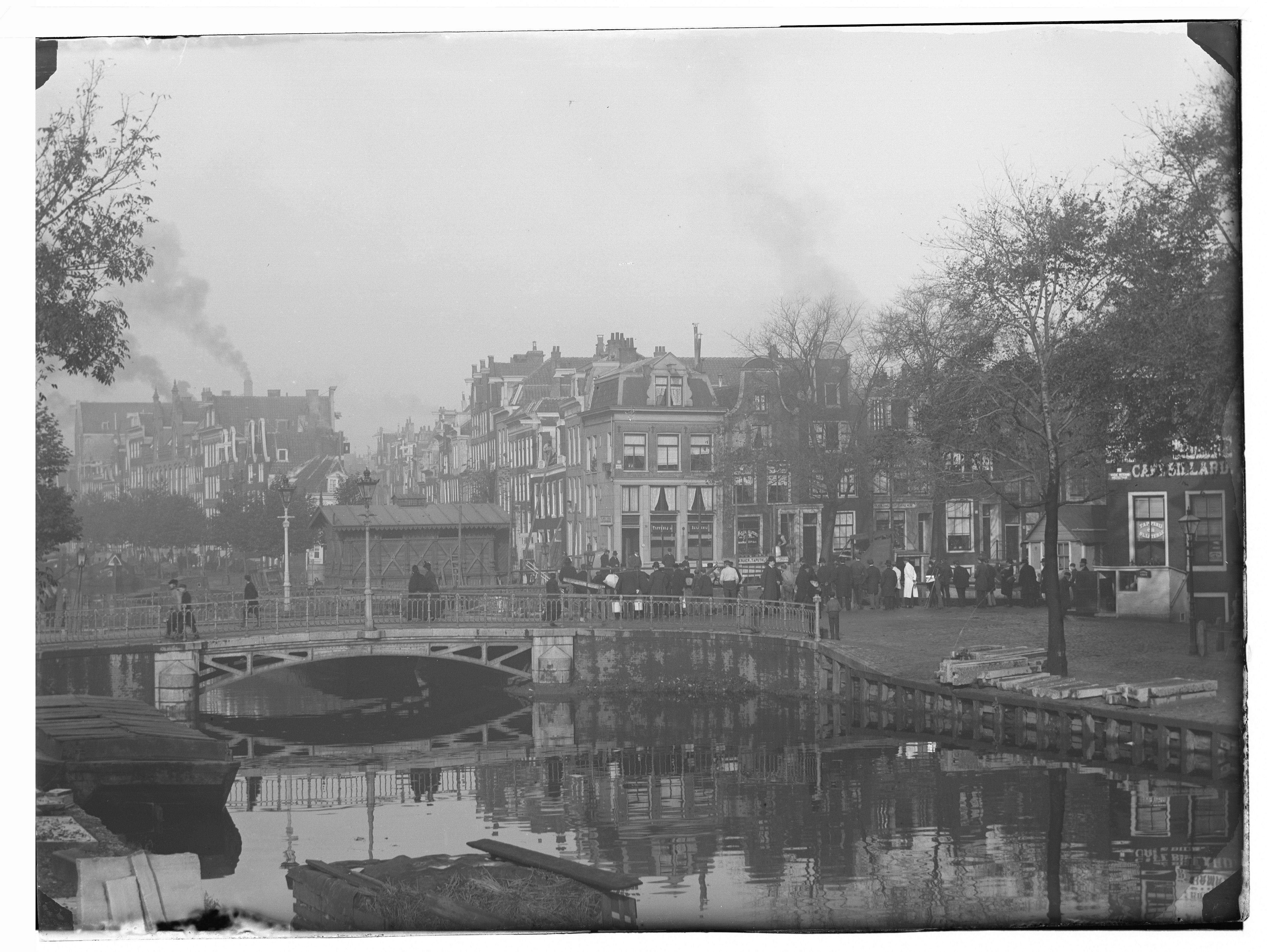 Beschrijving Lijnbaansgracht Gezien vanaf Steenhouwerij Guillot & Smit``, Weteringschans 101 in westelijke richting naar brug 97 voor de Spiegelgracht. Rechts: hoekhuis Spiegelgracht 27 Café-Billard. Documenttype foto Vervaardiger Olie``, Jacob (1834-1905) Collectie Collectie Jacob Olie Jbz. Datering 1890 Geografische naam Lijnbaansgracht Inventarissen Afbeeldingsbestand 010019000061 Generated with Dememorixer